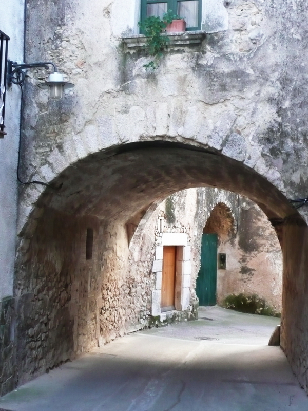 Arc en un carrer de Vilanant (Alt Empordà)